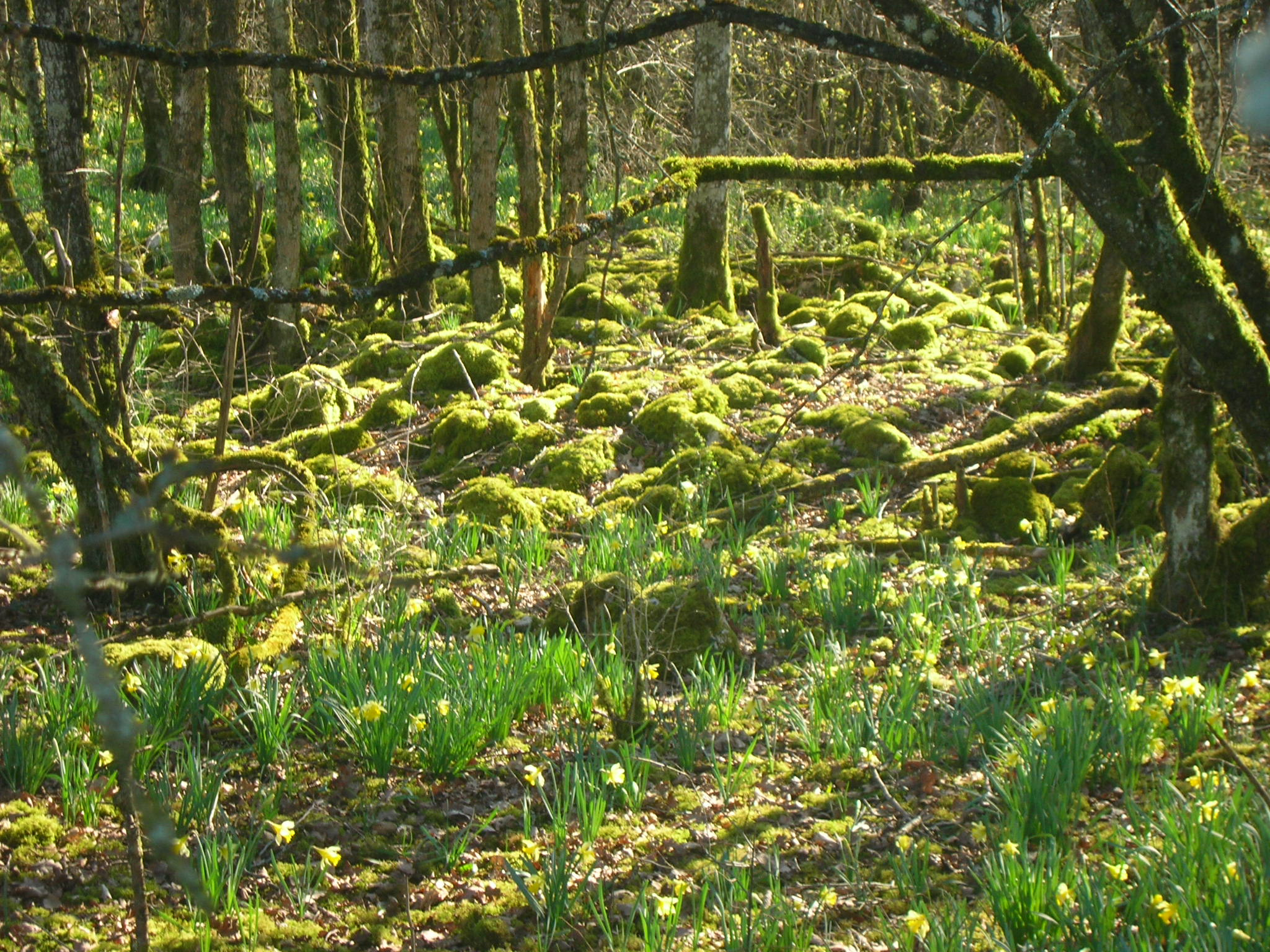 Forêt d'Arc-en-Barrois en Haute-Marne